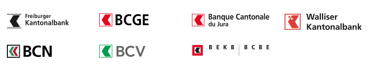 gggg